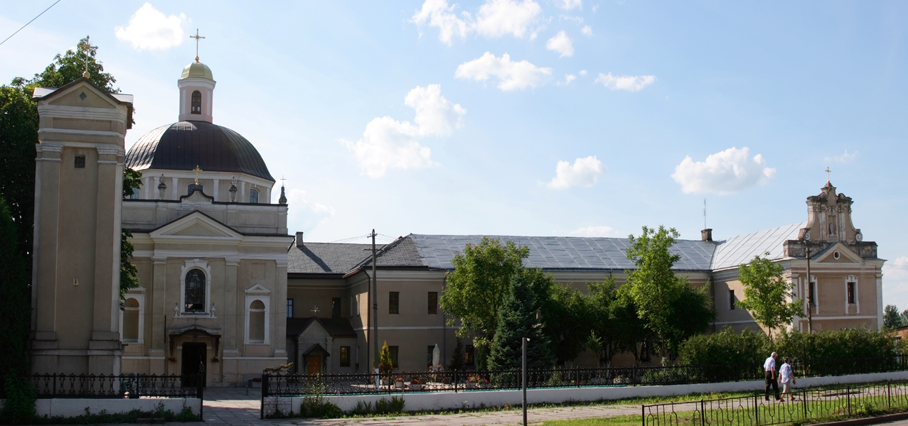 Бывший монастырь василиан и церковь Юра в Червонограде